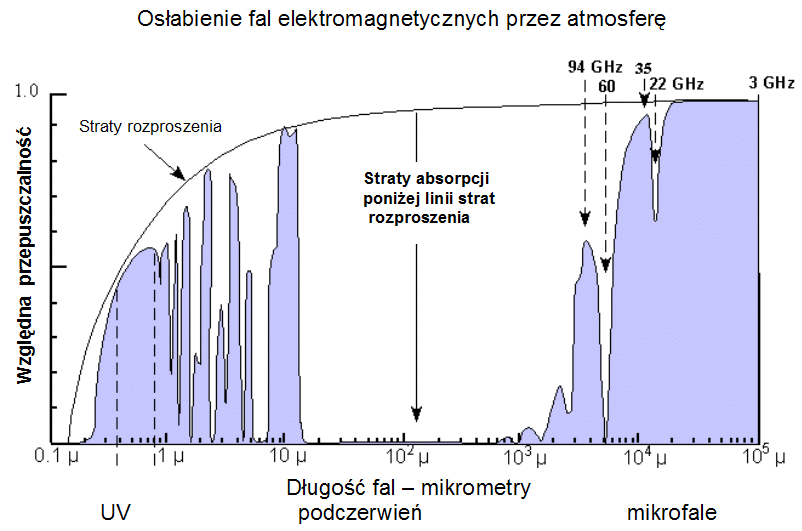 Pochłanianie fal elektromagnetycznych przez atmosferę.